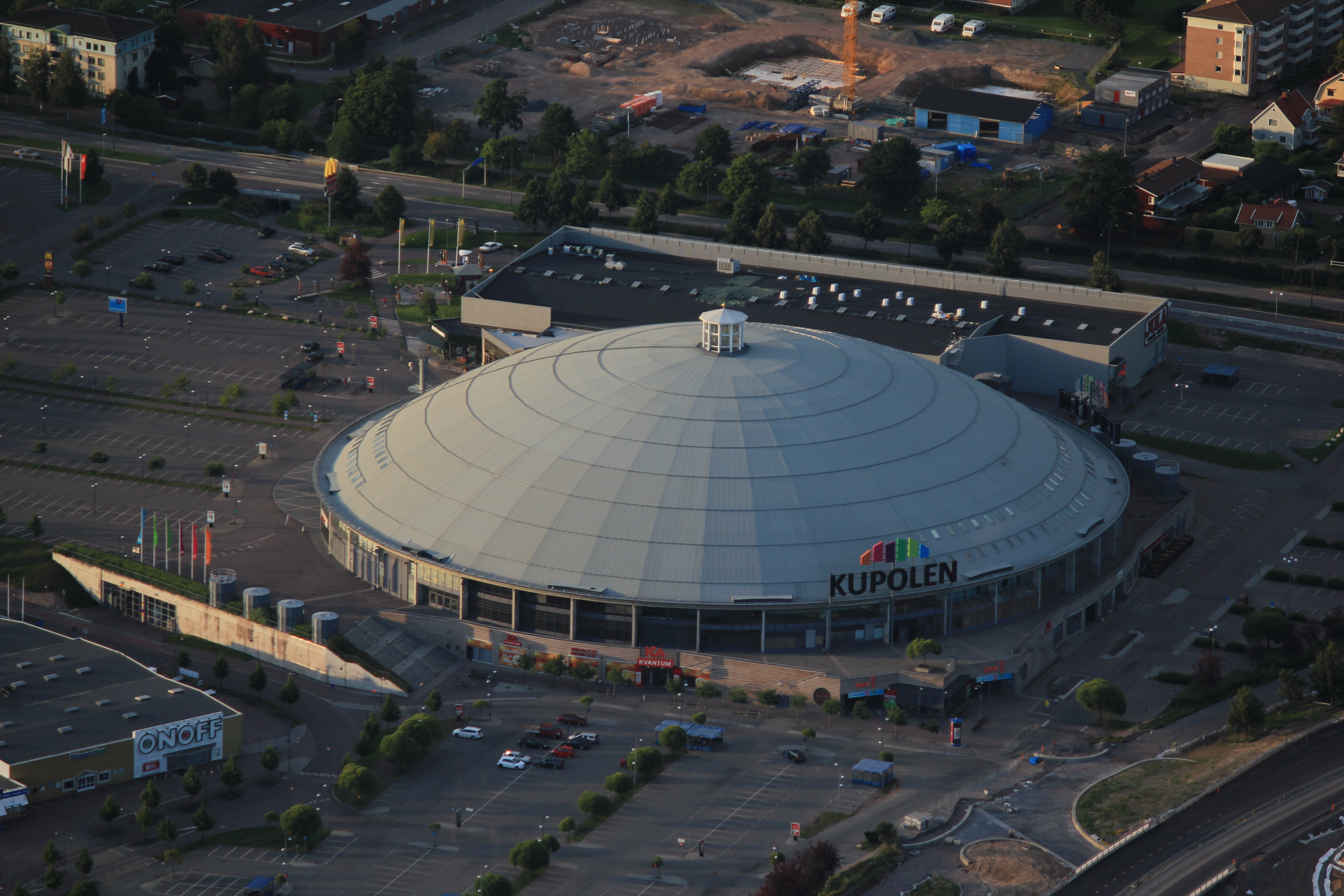 Flygfoto över Kupolen, Borlänge, Dalarnas län, Sverige This aerial photograph has been approved for publishing by the Swedish Armed Forces with the ID: FMTM 10 830:11043 This tag does not indicate the copyright status of the attached work. A normal copyright tag is still required. See Commons:Licensing for more information.